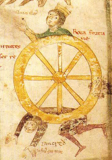 Kolo štěsteny s Jindřichem VI. nahoře a Tankredem dole